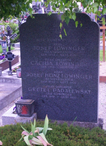 Gretl Löwingers Grabstätte in Ybbs an der Donau. Der Grabstein des Familiengrabs in Ybbs an der Donau nennt das korrekte Sterbejahr von Josef Löwinger sowie das korrekte Geburtsdatum von Josef (alias Heinz) Löwinger